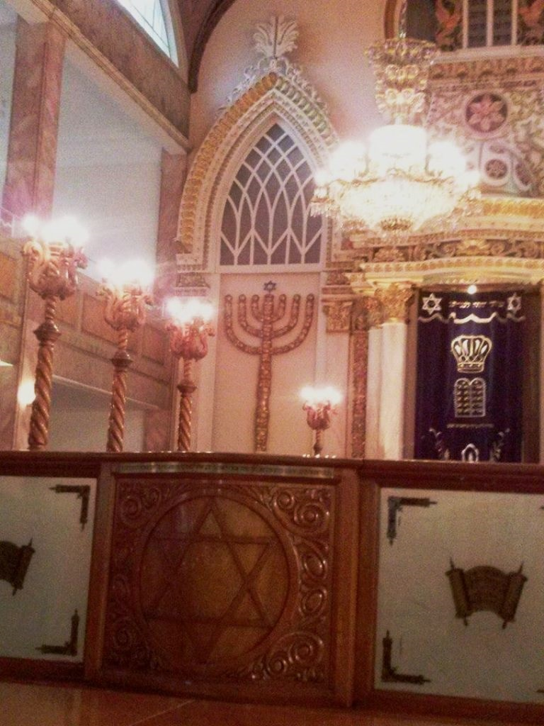 Sinagoga